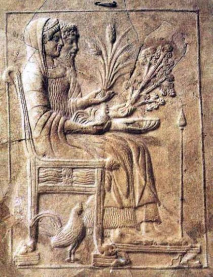 Antigo relevo grego representando Hades e Perséfone, numa visão agrícola do mito